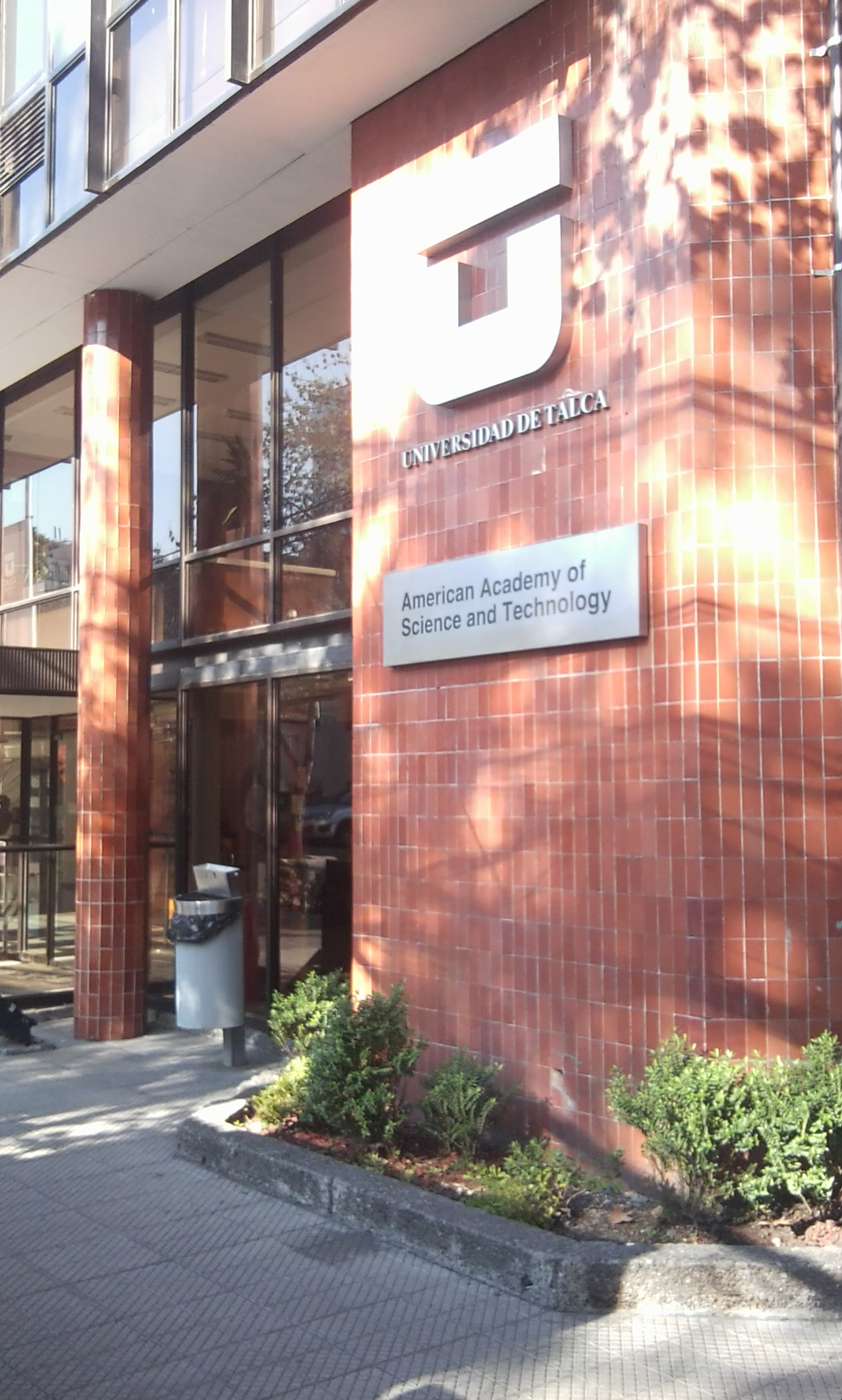 Campus Providencia de la Universidad de Talca, en Santiago (Quebec esq. Condell, Providencia).